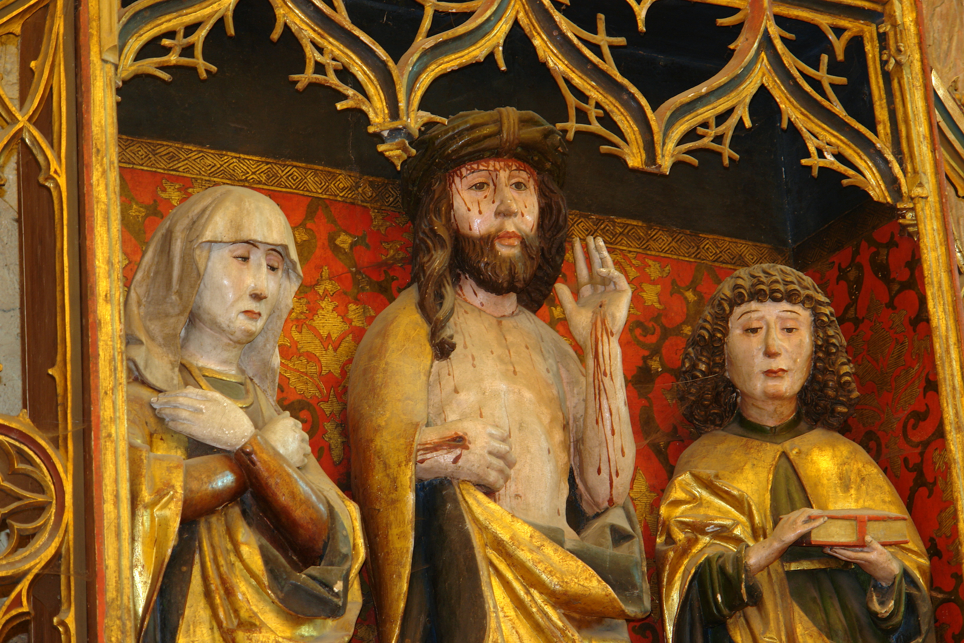 Szent Erzsébet, egykori antonita kolostor-templom Szepesdarócon